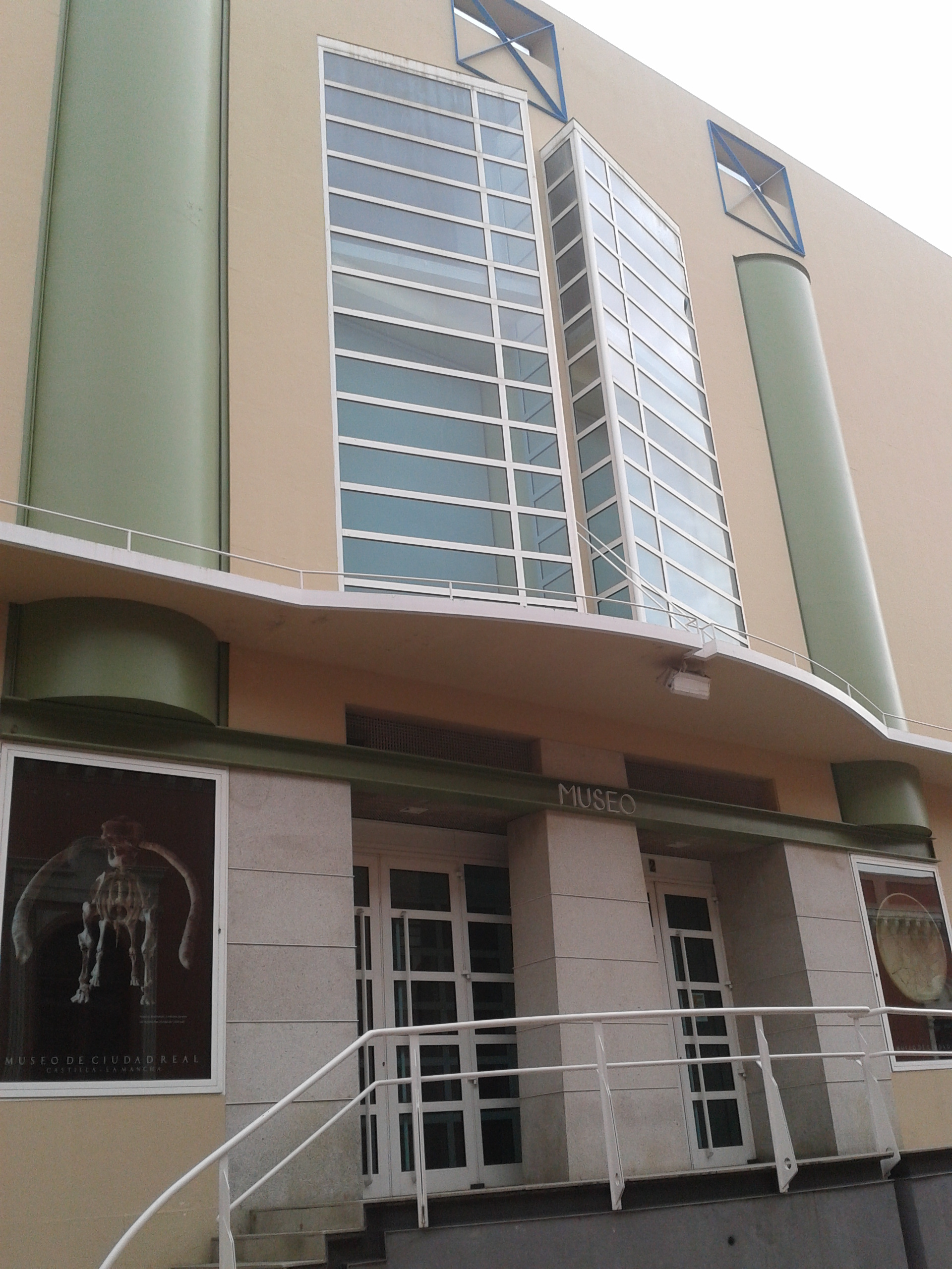 Entrada al Museo de Ciudad Real.